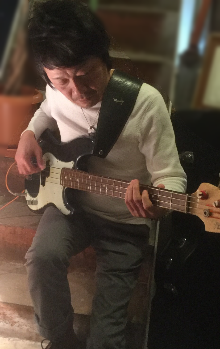 恵美直也・豪徳寺・2018年2月撮影